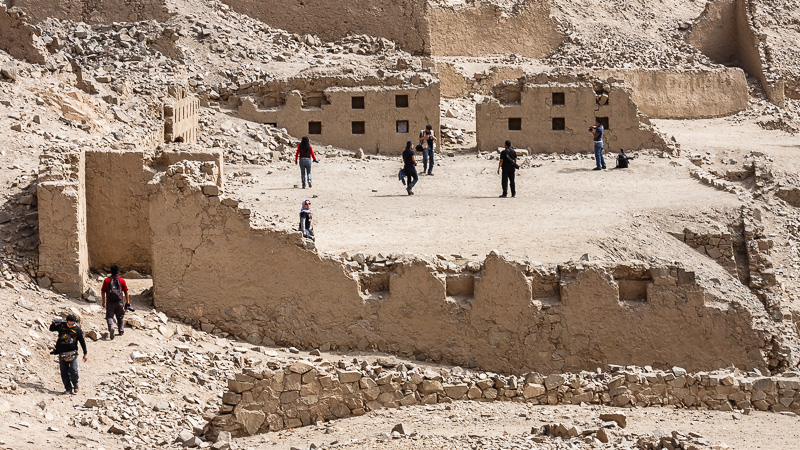 Patio